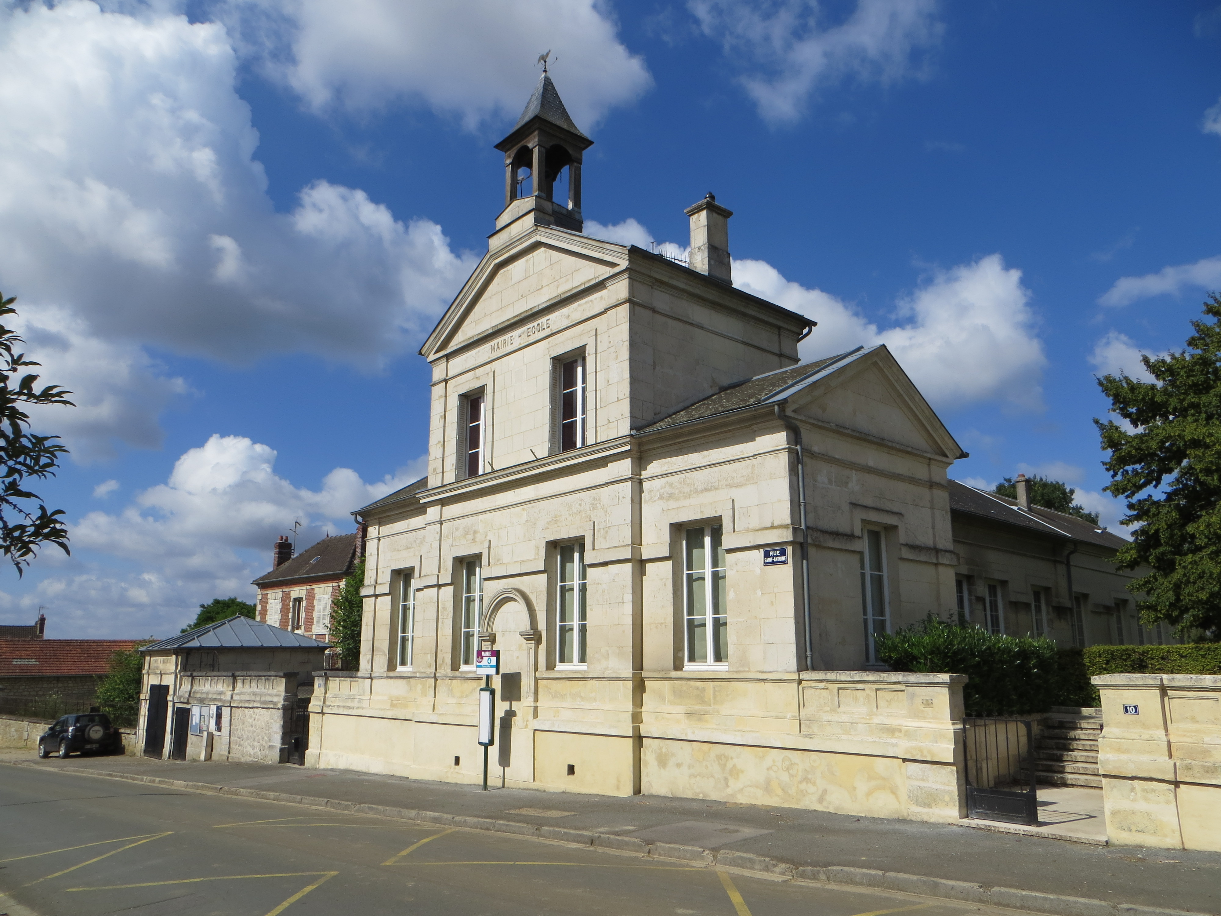 Mairie